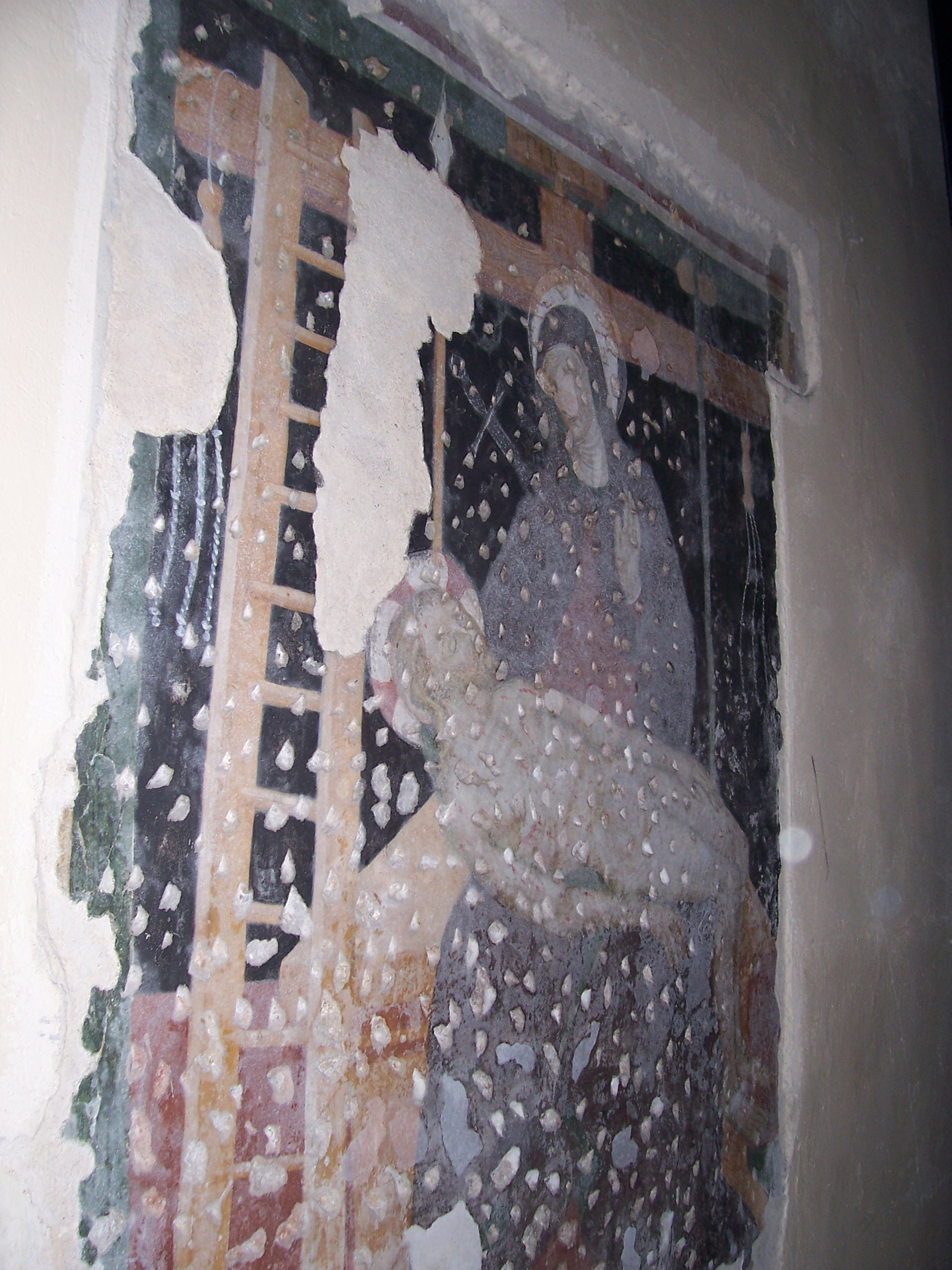 san desiderio brescia affresco abside.jpg